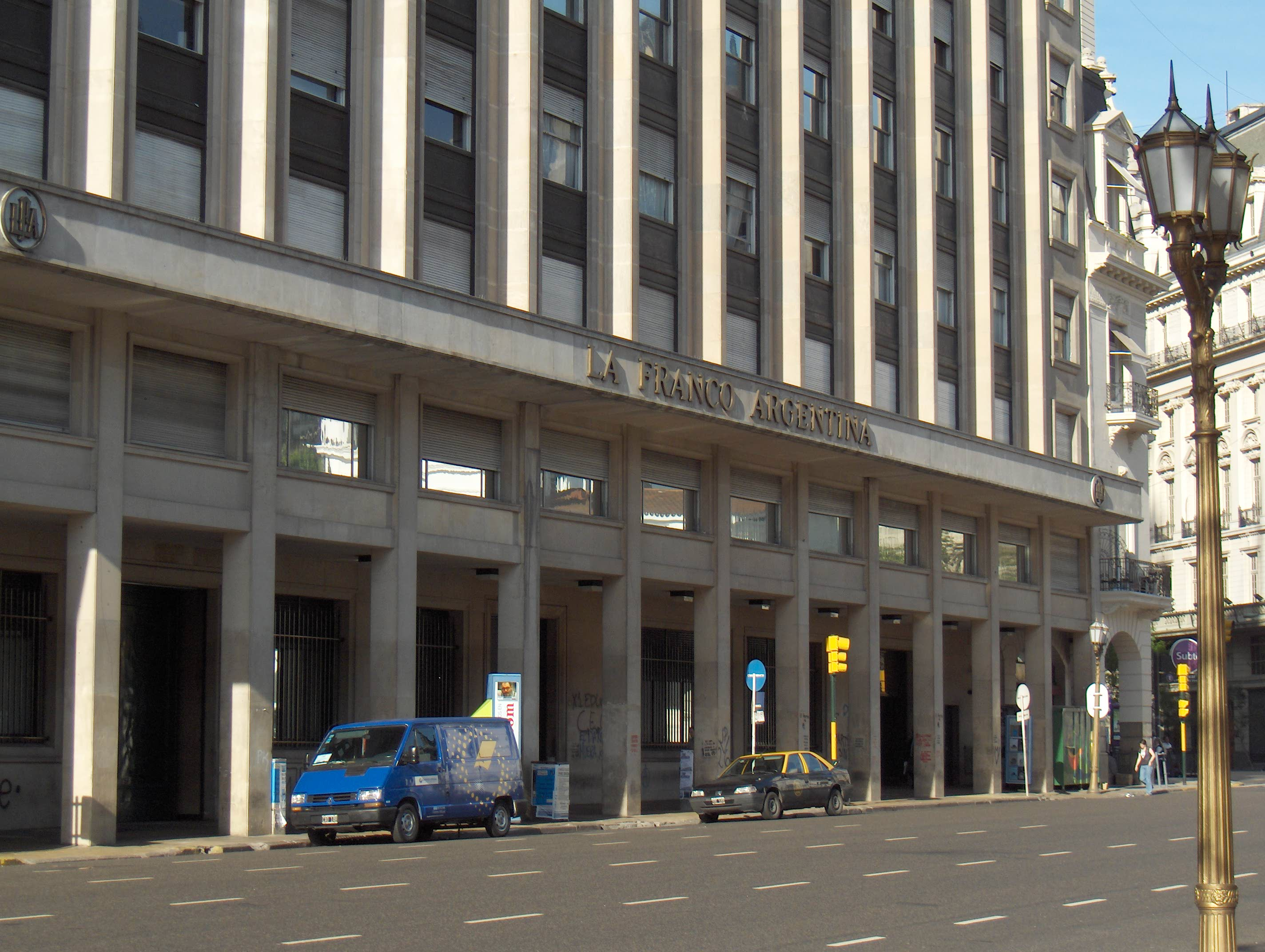 Zona SO de la Plaza de Mayo, Buenos Aires, Argentina.